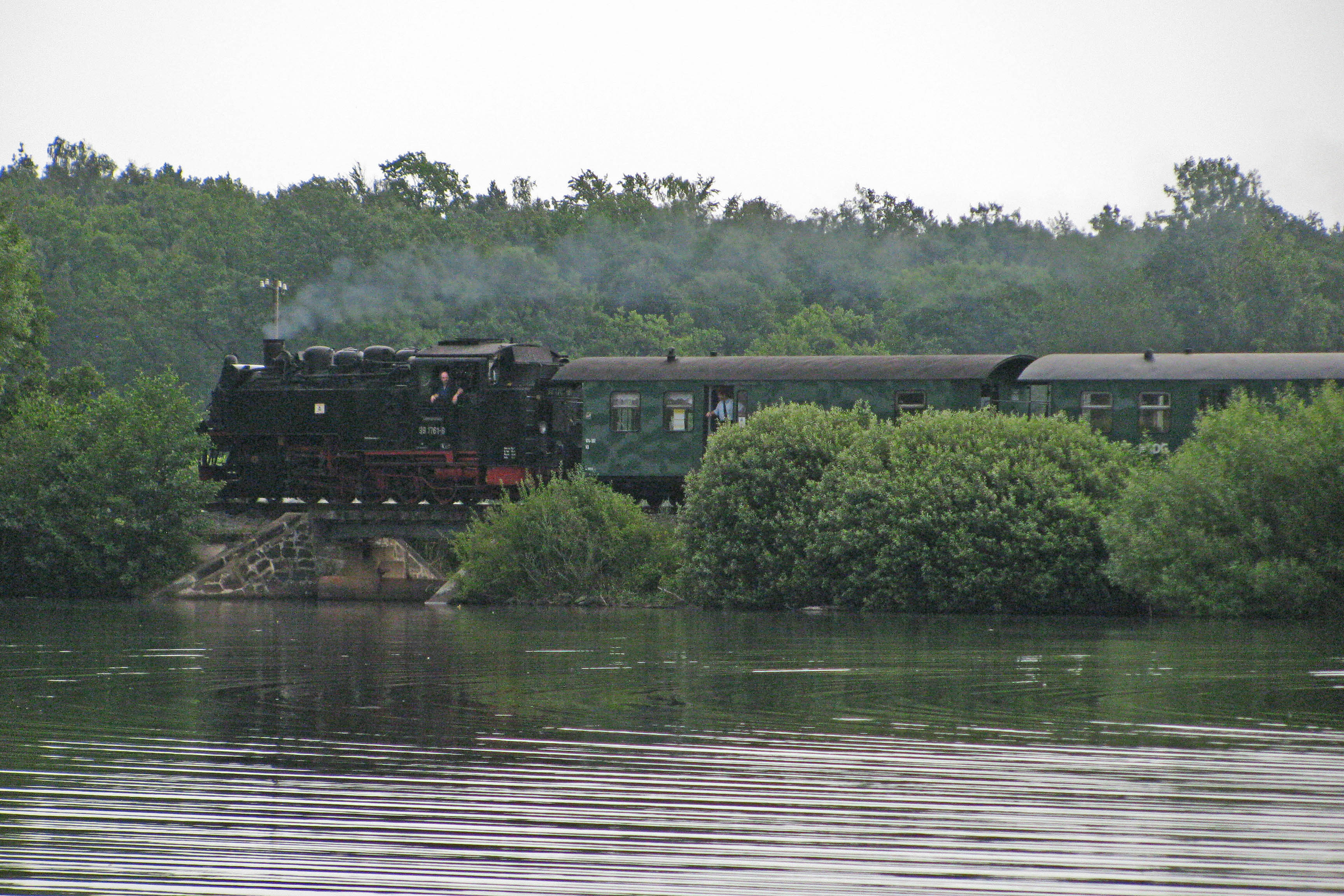 Lößnitzgrundbahn überquert Damm durch bzw. Brücke über den Dippelsdorfer Teich, Dippelsdorf im Ortsteil Friedewald, Gemeinde Moritzburg, Sachsen.